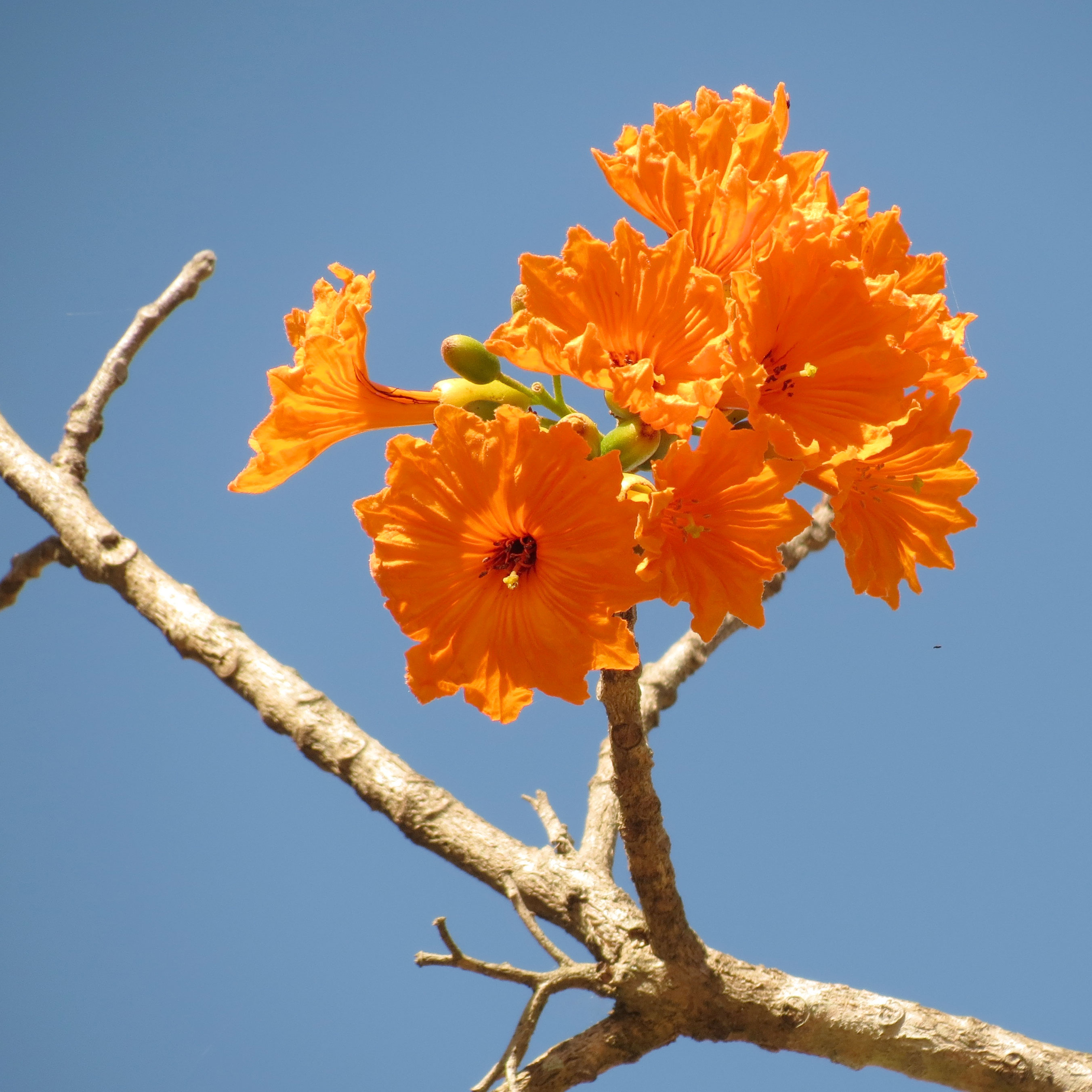 Cordia dodecandra. Sitio arqueológico Uxmal, Yucatán, México.